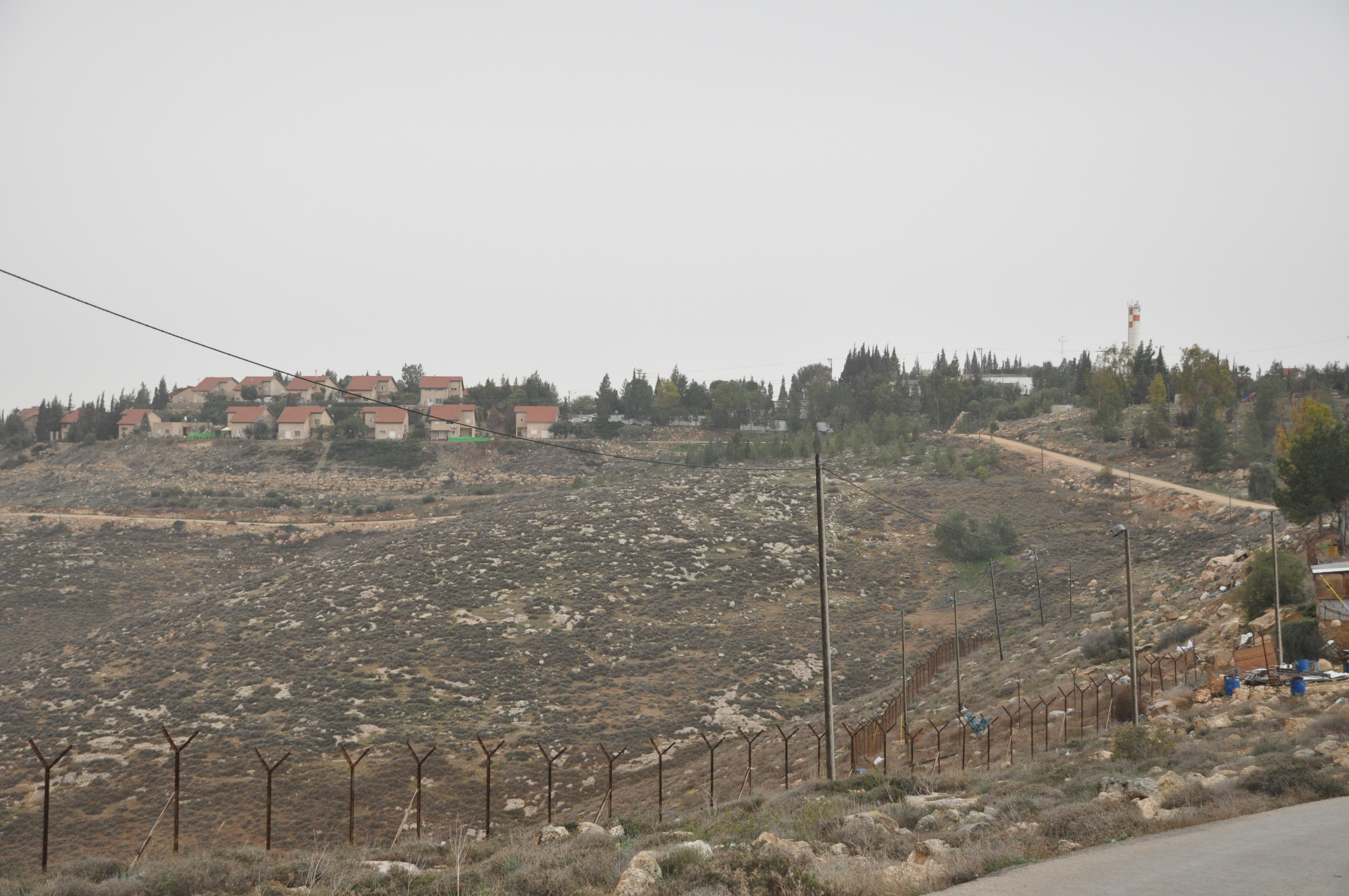 היישוב טנא עומרים